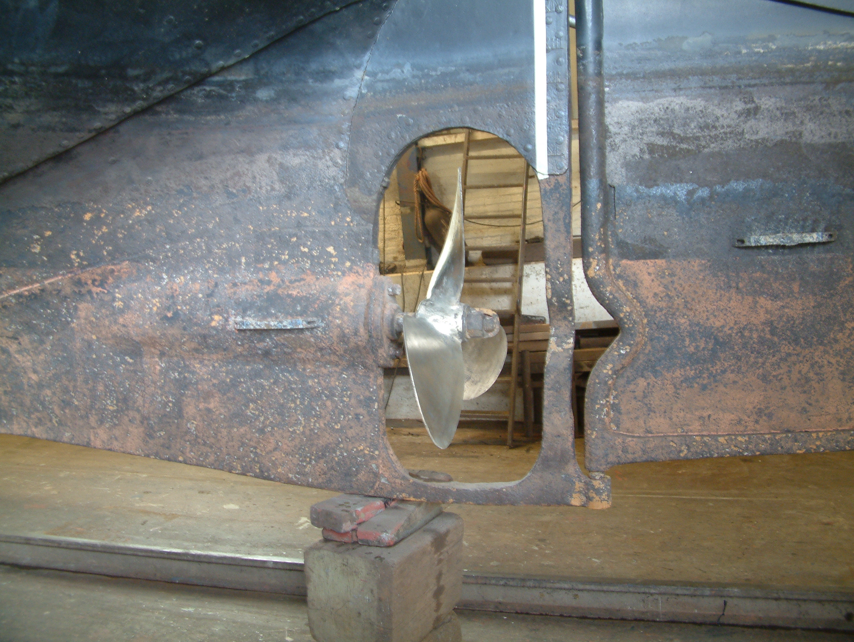 De hak onderaan het schroefraam, met de roerkoning en de schroef